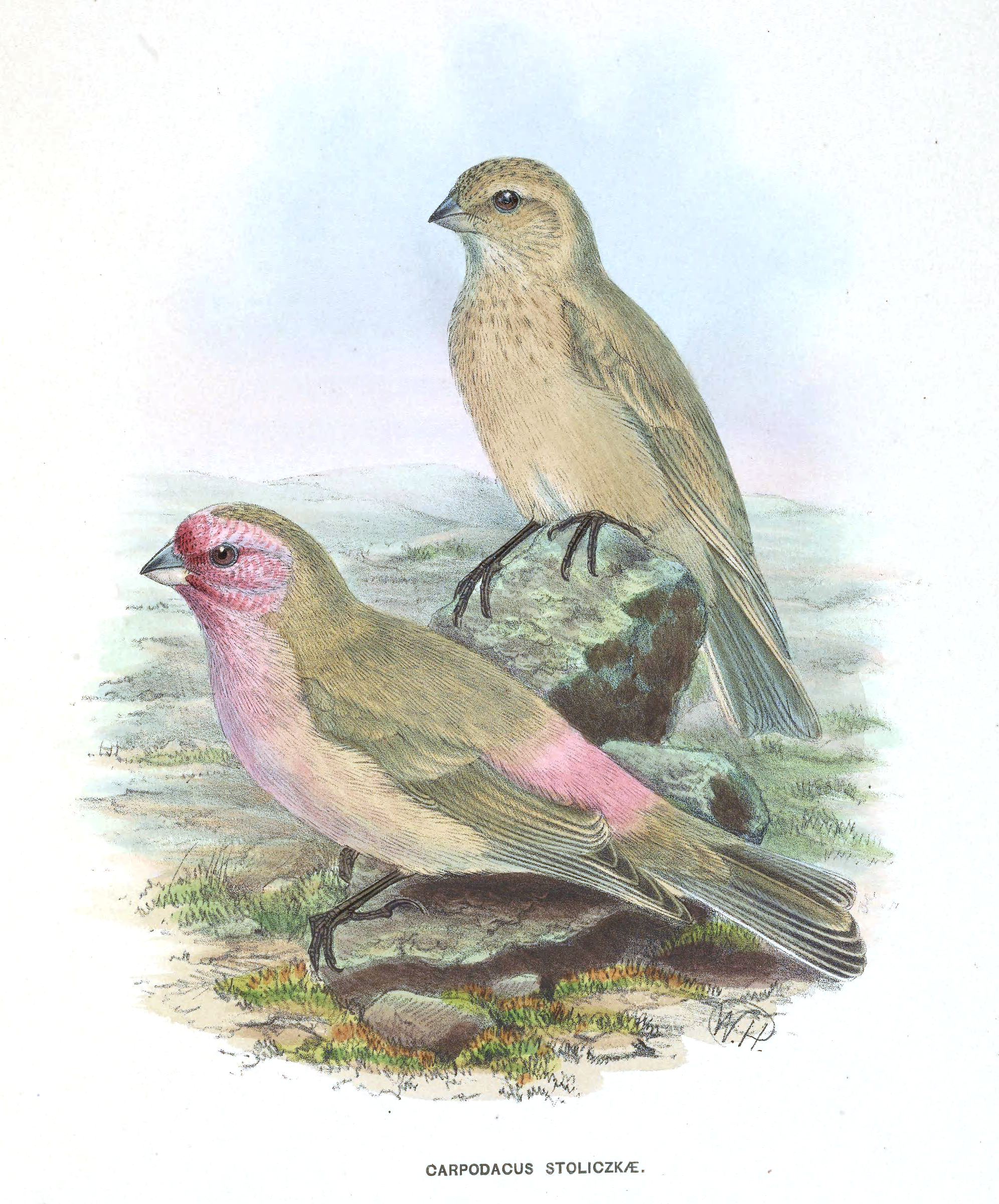 Carpodacus stoliczkae